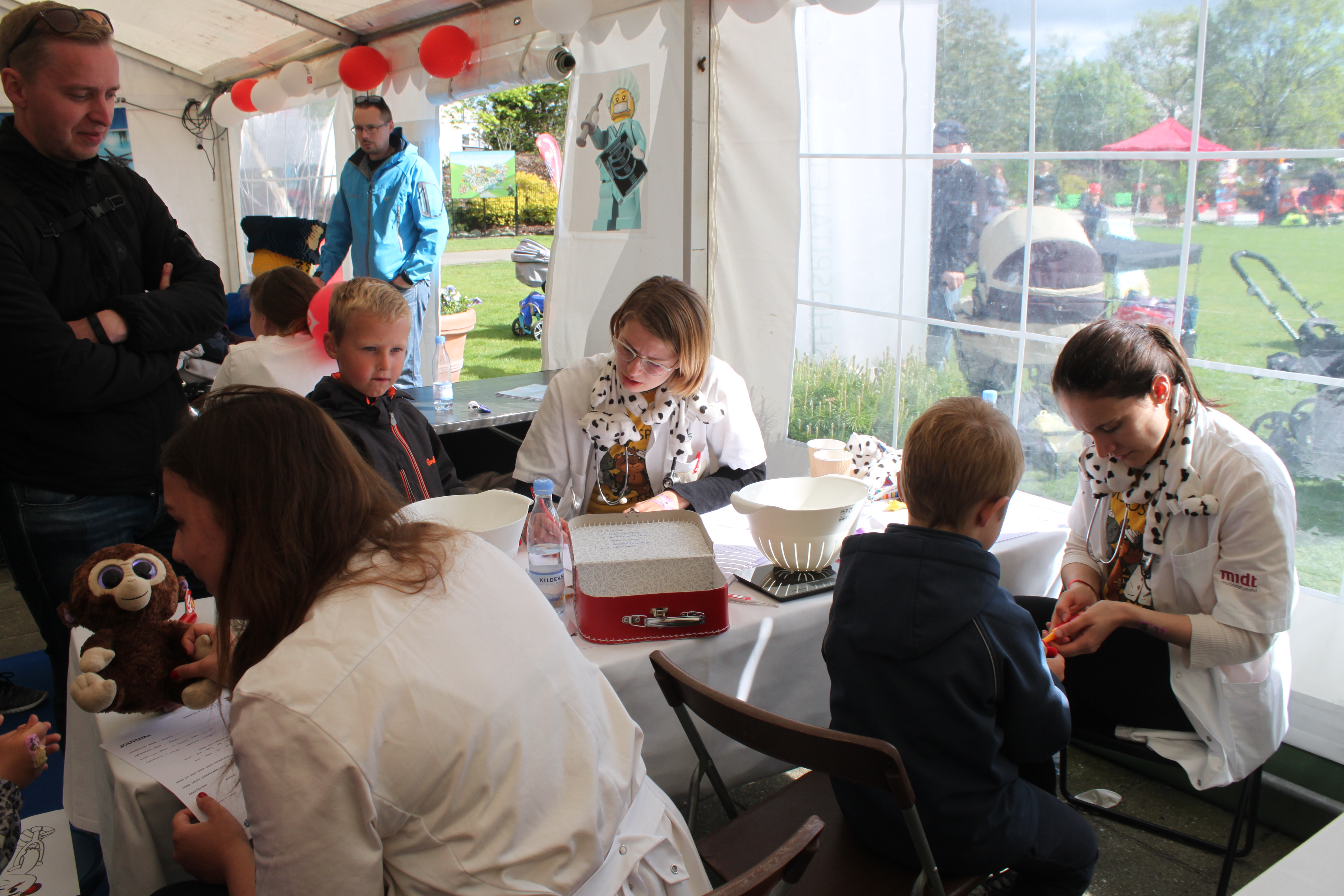 Bamsehospitalet® i aktion.